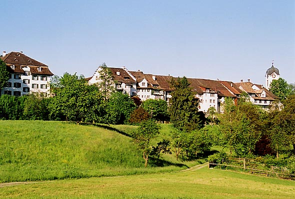 Blick auf das Städtchen Grüningen.